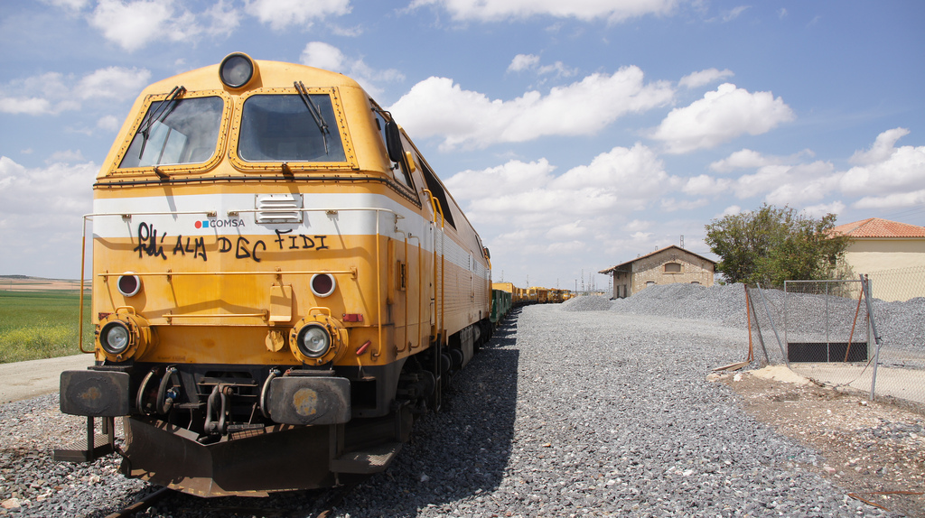 Locomotora MZ III de COMSA en la estación de Tembleque.